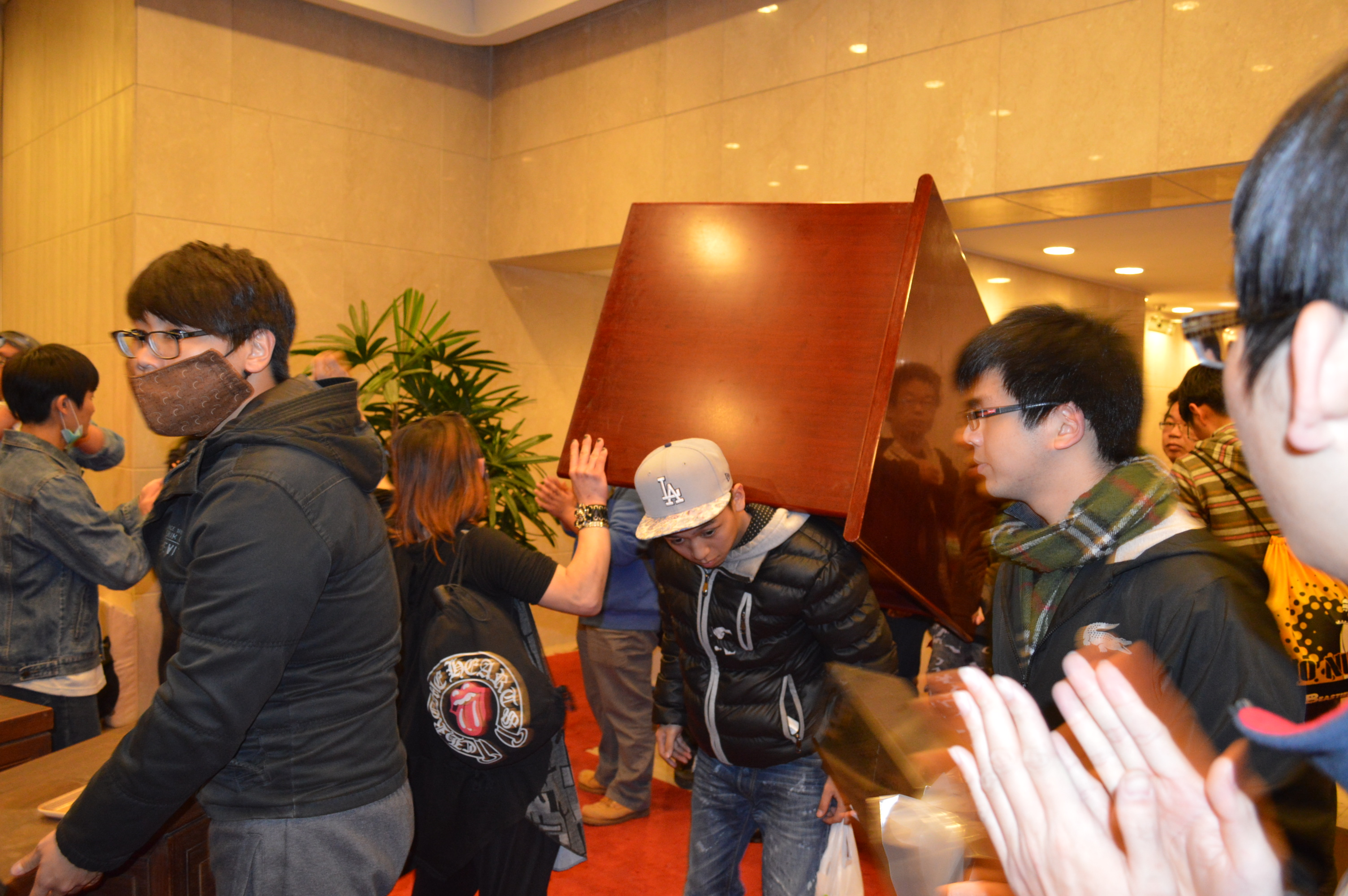 貴賓廳內行動忙。